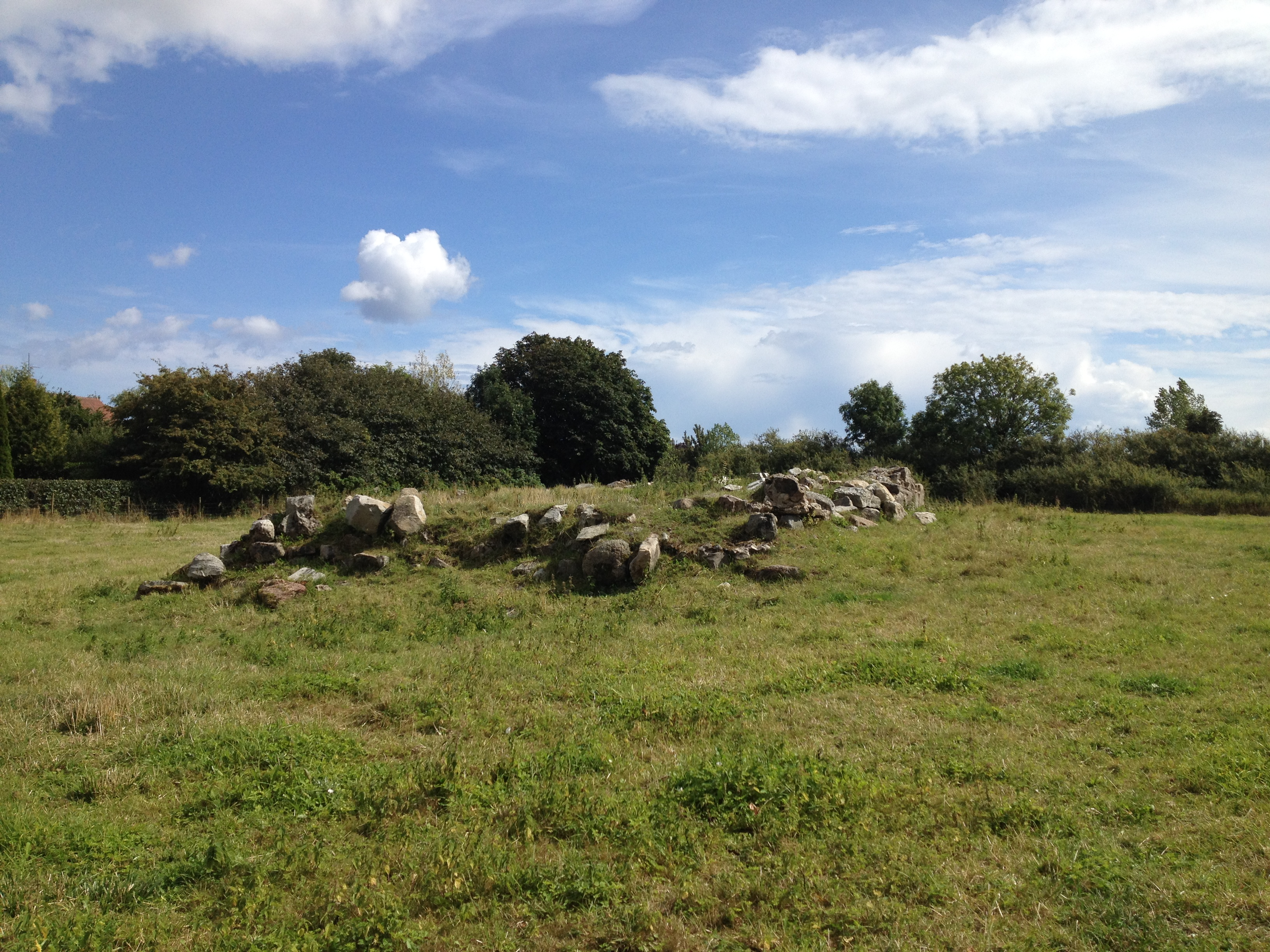 Gladsaxehus, ruiner